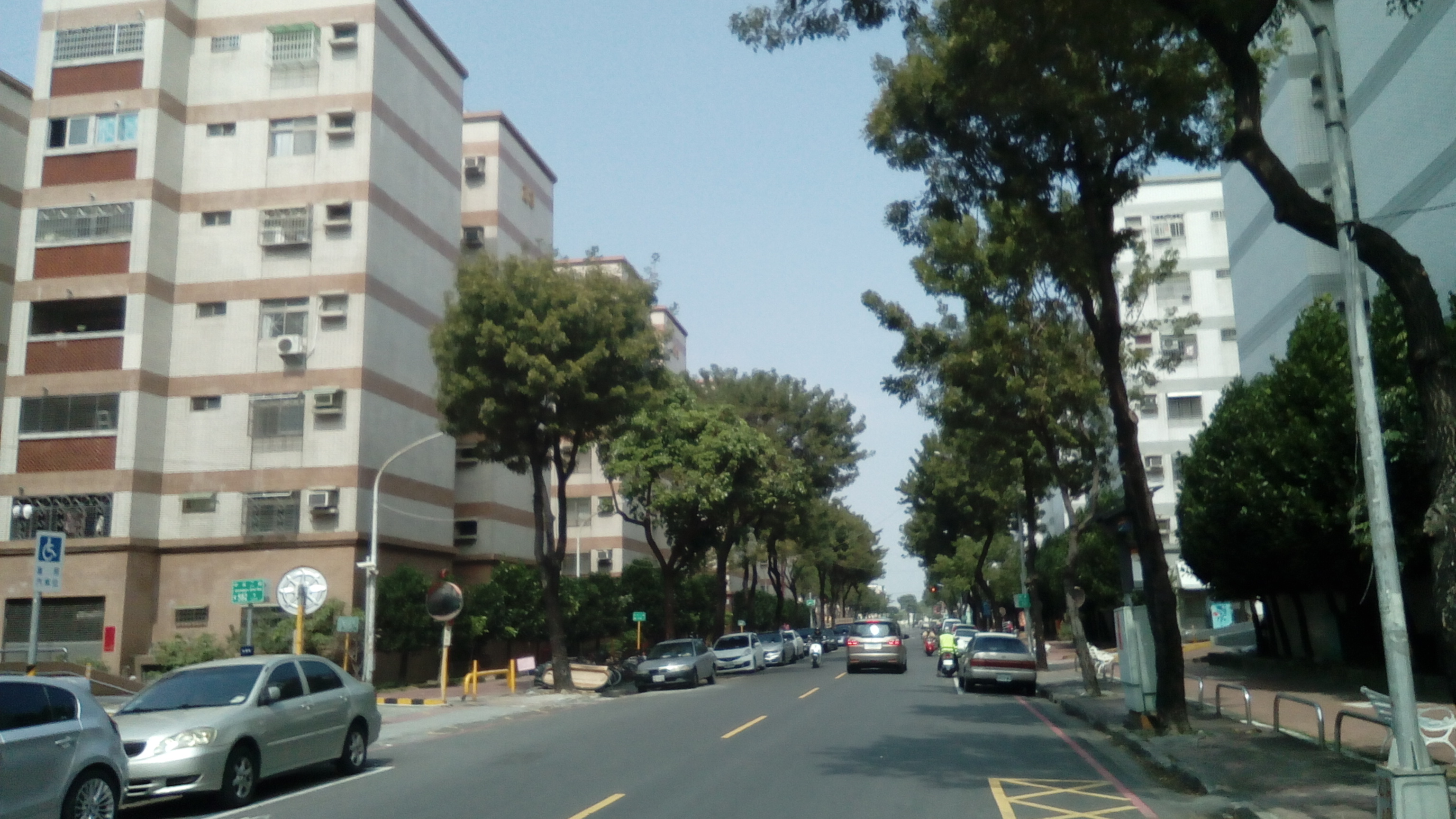 同上